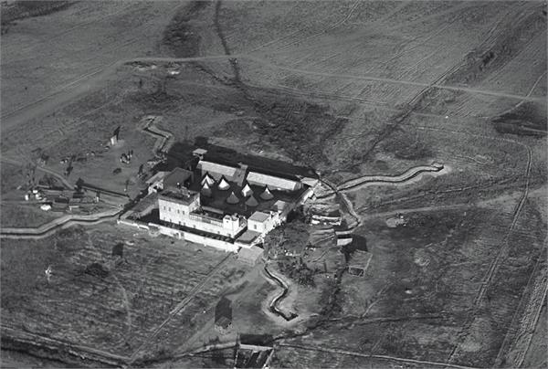 טירת צבי - מראה טירת צבי - צילום אויר